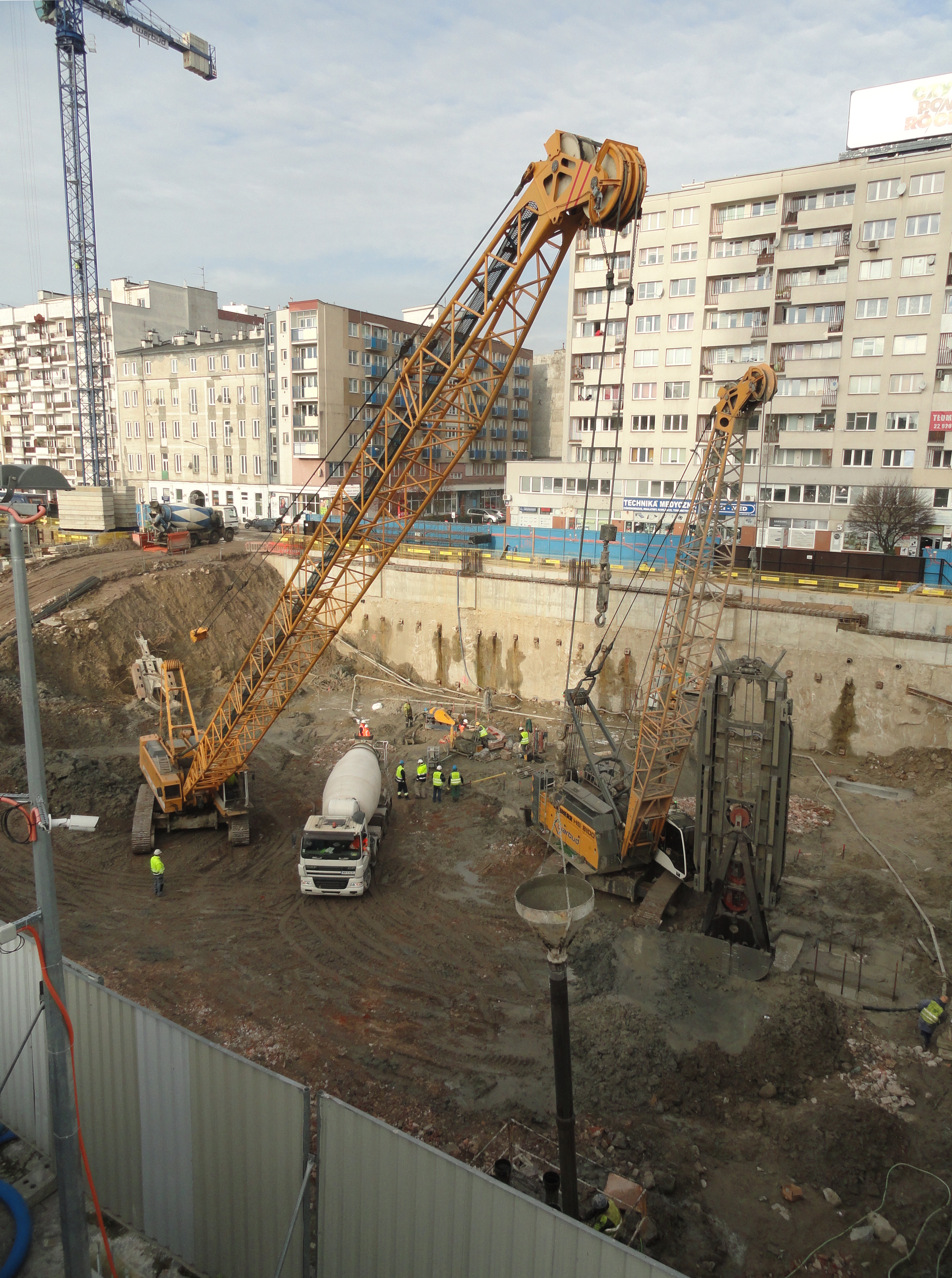 Plac budowy wieżowca Varso widziany z platformy widokowej przy alei Jana Pawła II.